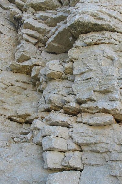 Lubjakivi